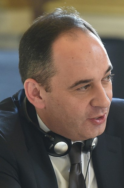 EPP Summit, December 2015